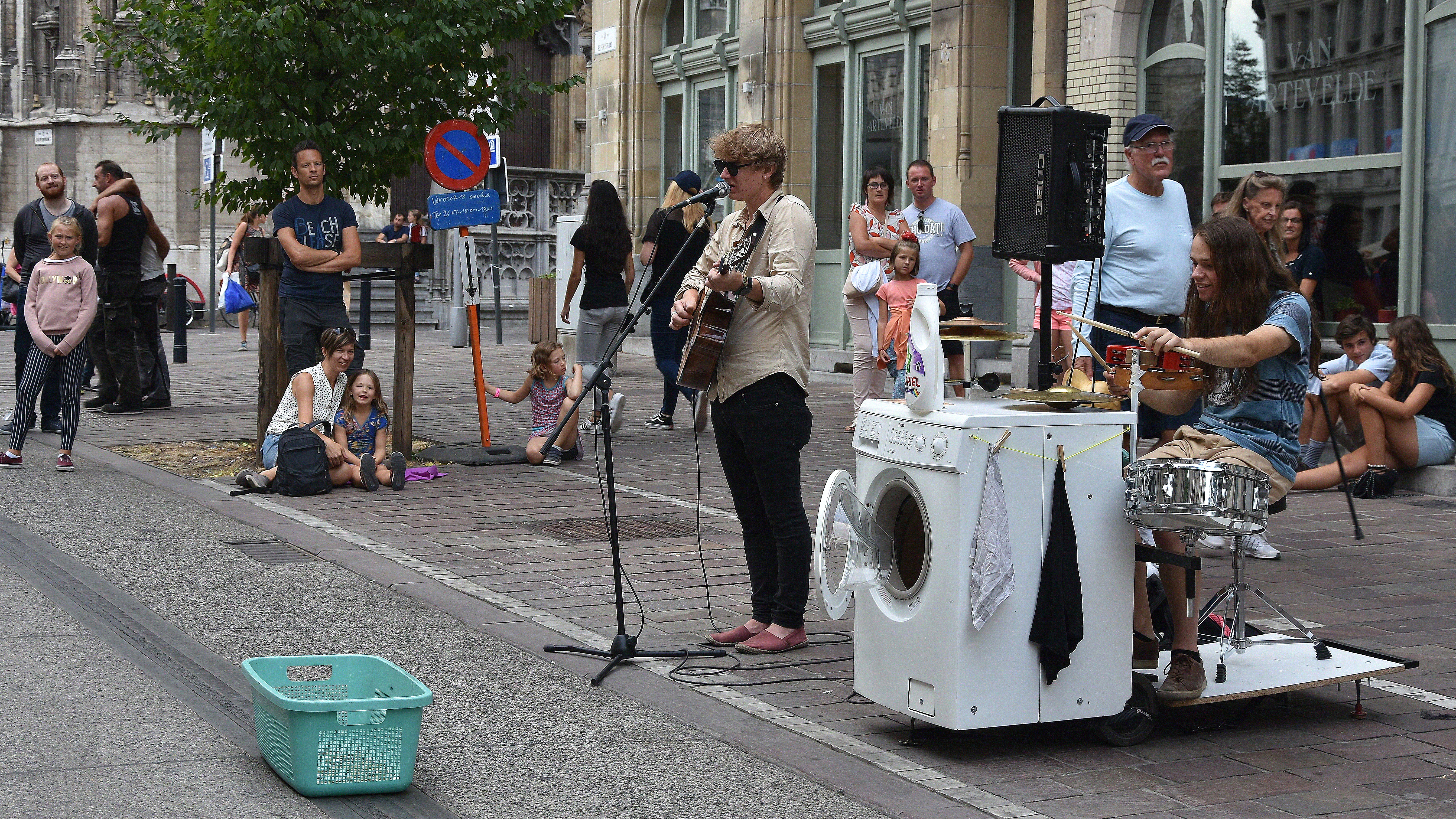 Gentse feesten 2018 18-07-2018 This photo of immaterial heritage has been taken in the Flemish Region